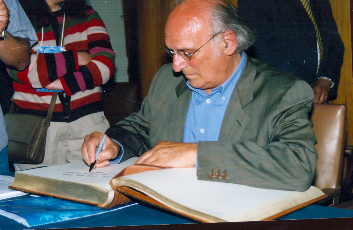 Director Carlos Saura; Firma libro de visita Ilustre; año 2002